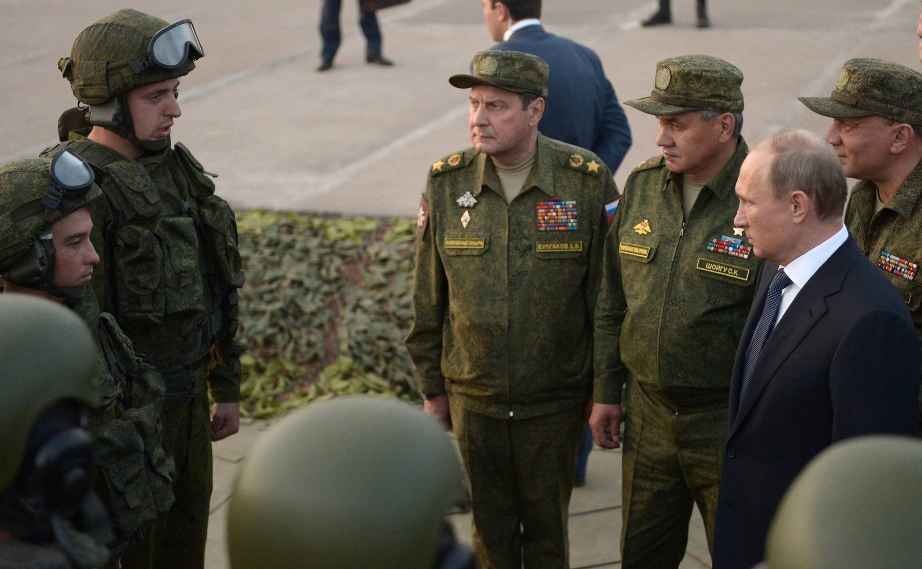 Верховный Главнокомандующий Вооружёнными Силами России Владимир Путин на завершающем этапе стратегических командно-штабных учений «Центр-2015» на полигоне «Донгузский» в Оренбургской области